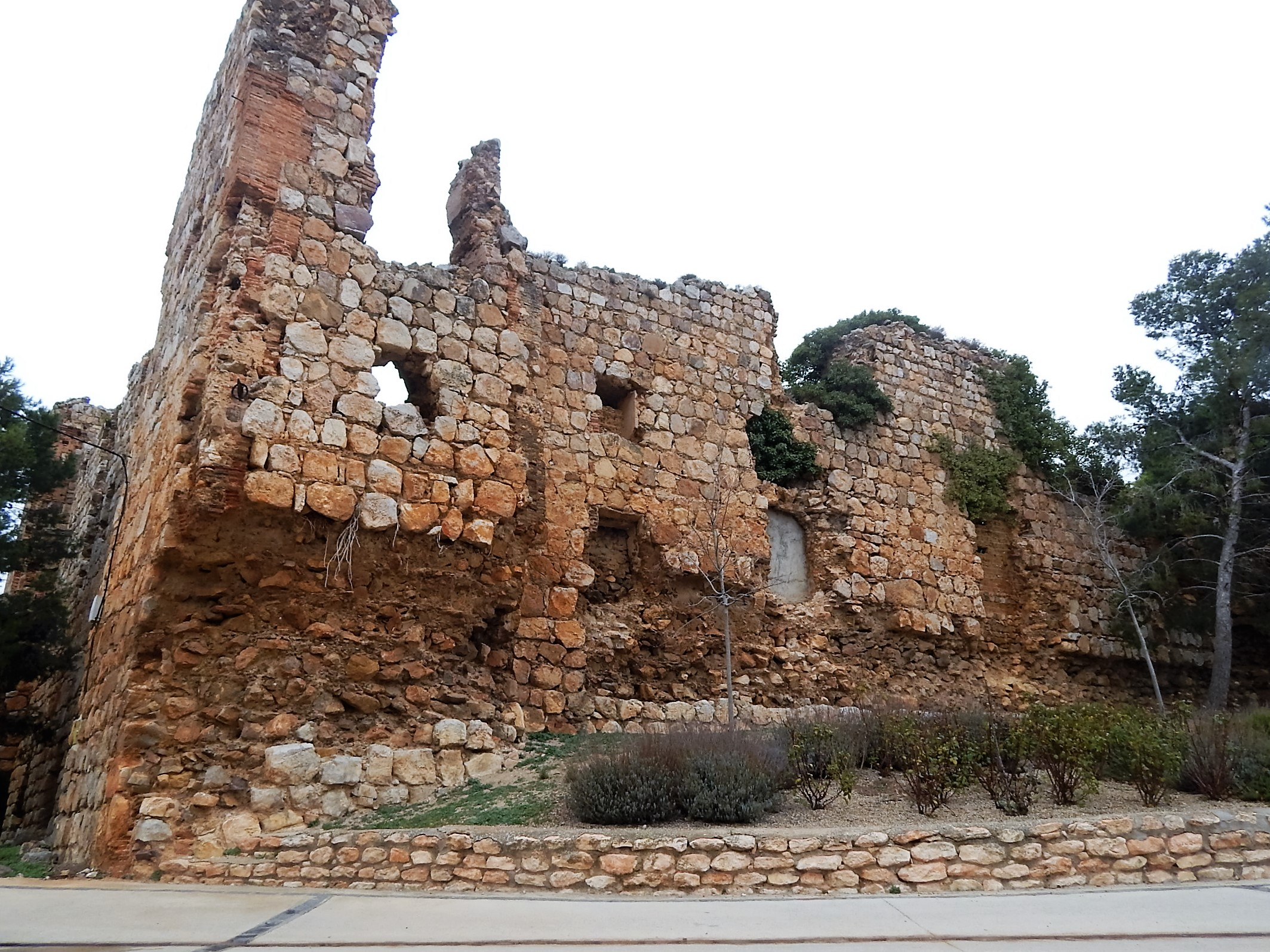 Castillo de Almonacid de la Sierra (España)